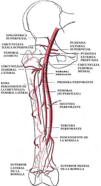 Esquema de la arteria femoral y sus ramas principales - muslo derecho, vista anterior.